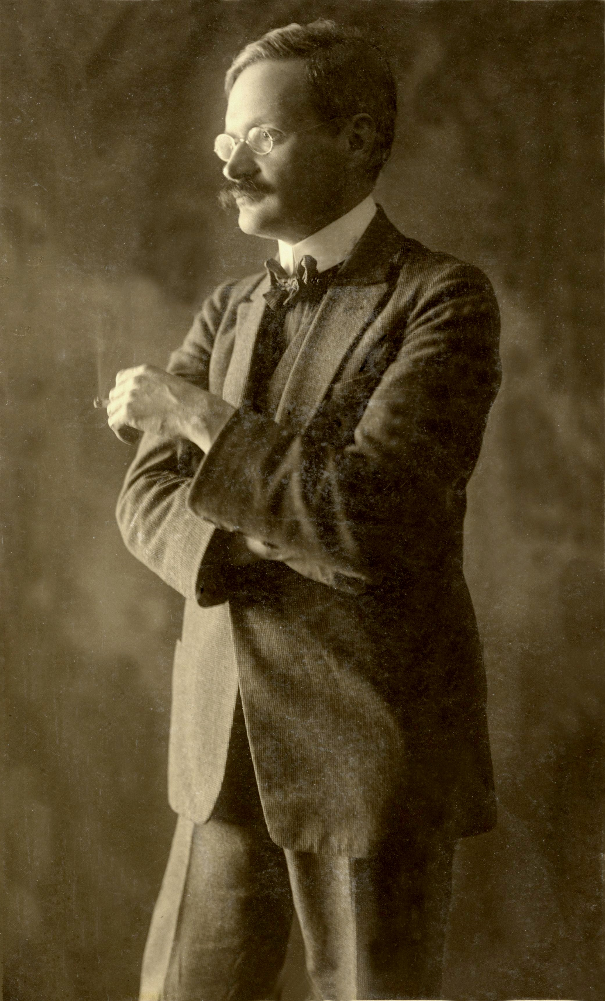 Dirigent en componist dr. Peter van Anrooy. 1917